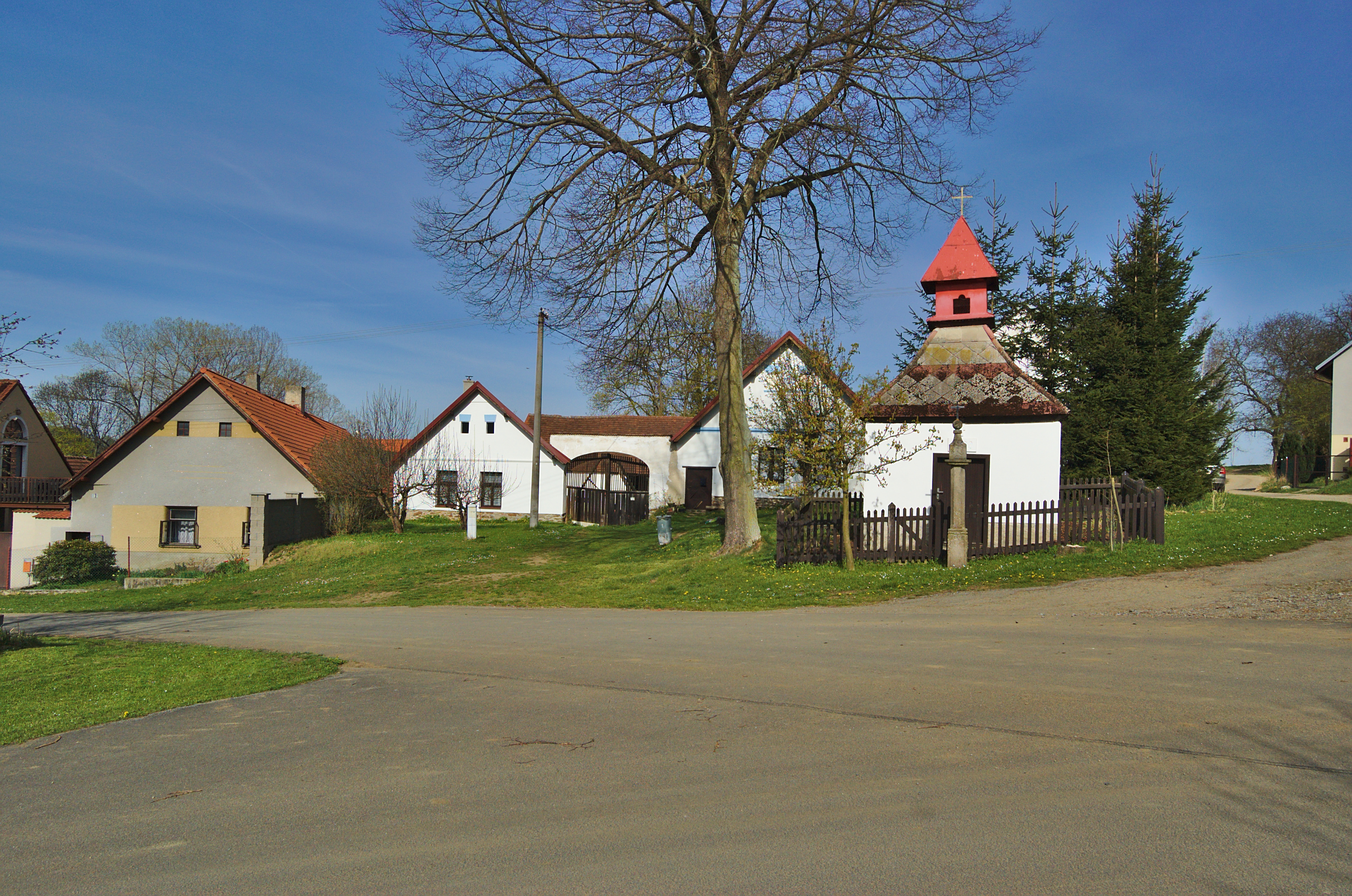 Kaple na návsi, Zlátenka, okres Pelhřimov Project: Fotíme Česko